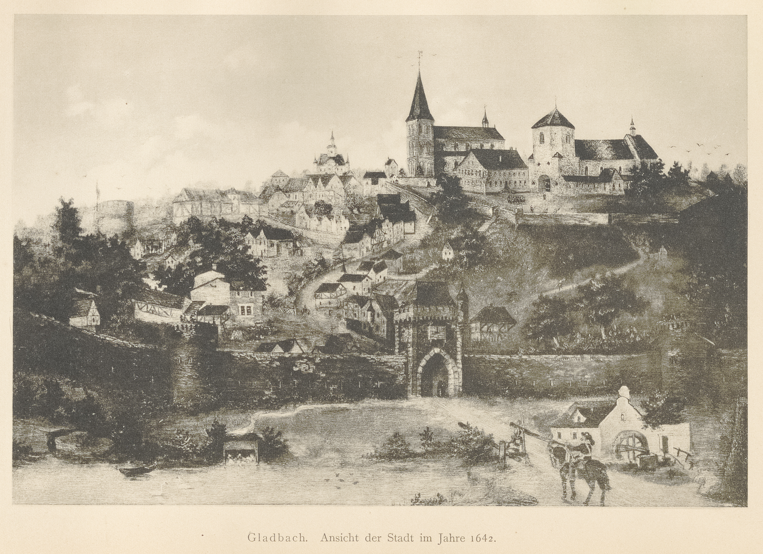 Ansicht der Stadt im Jahr 1642